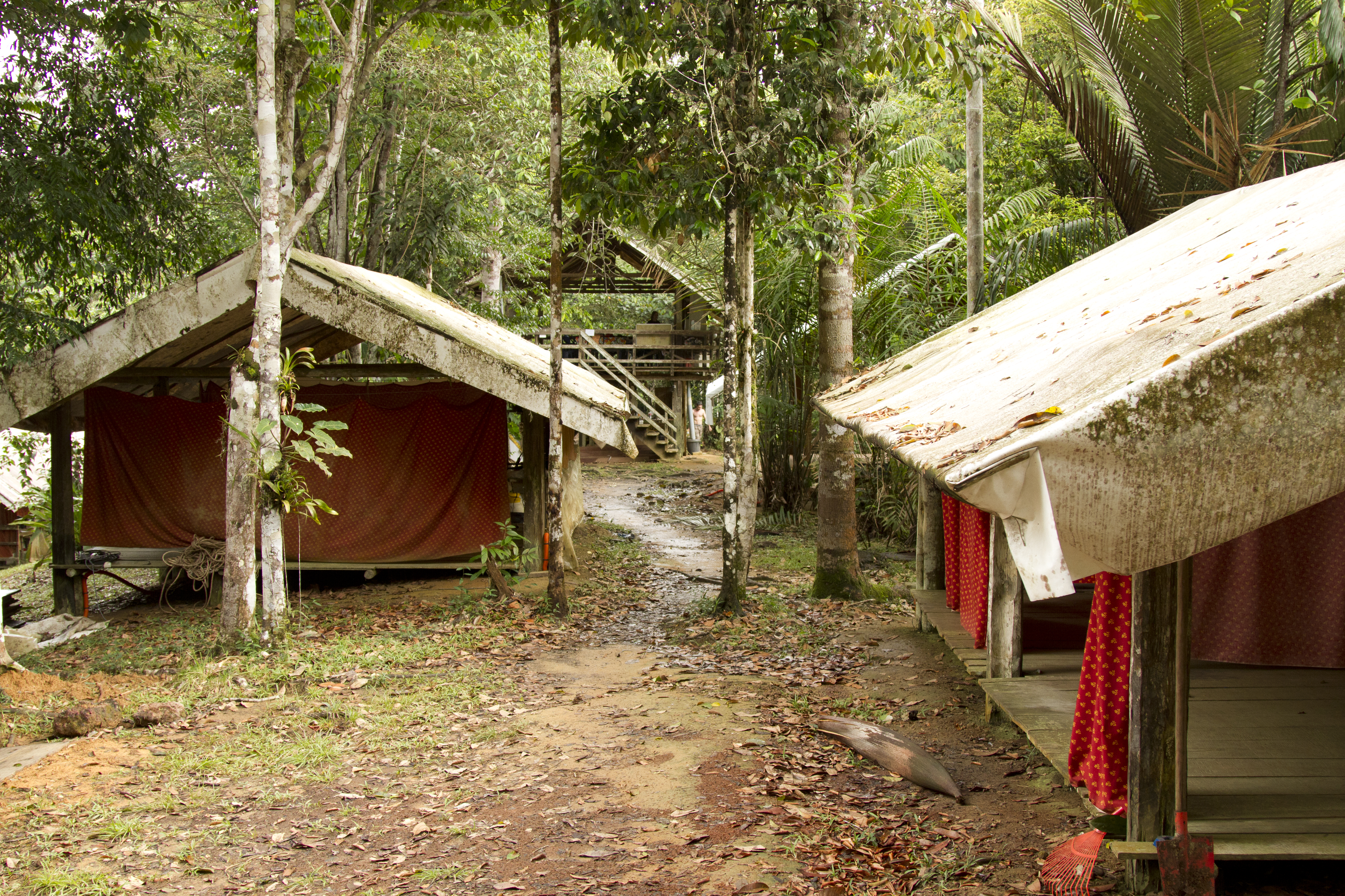 Karbette van die Inselberg-kamp van die CNRS (Nasionale Sentrum vir Wetenskaplike Ondersoek) in die Nouragues Natuurreservaat in Frans-Guyana